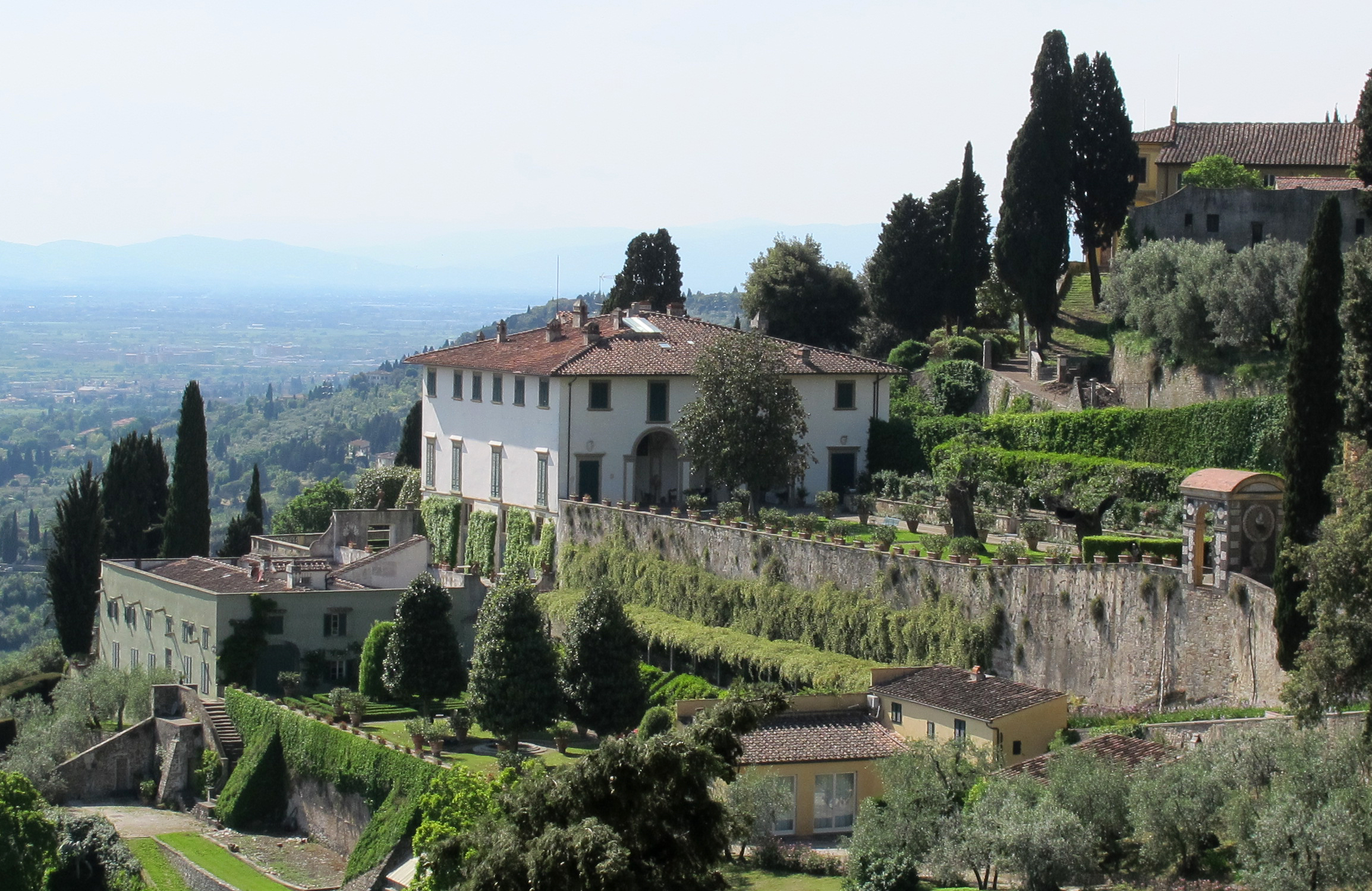 Villa medici di belcanto, veduta